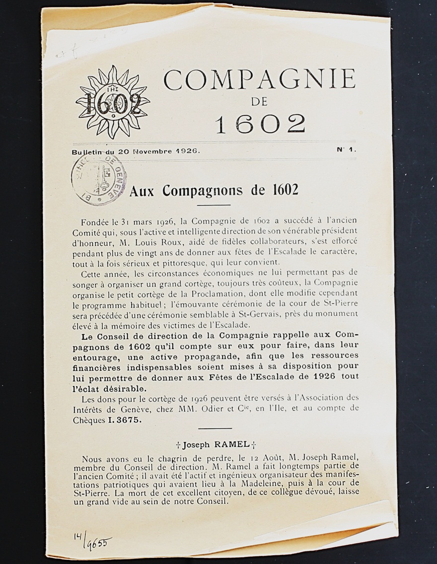 1er bulletin de la Compagnie. 20 novembre 1926. p.1